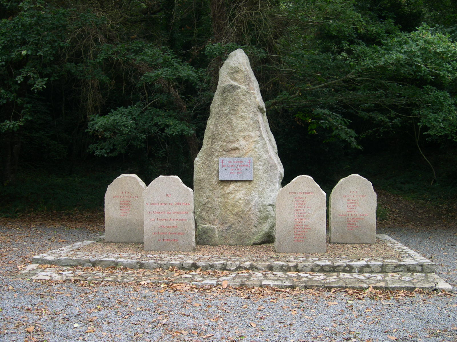 Monument de Kerhamon érigé en mémoire aux morts lors des combats de 1944